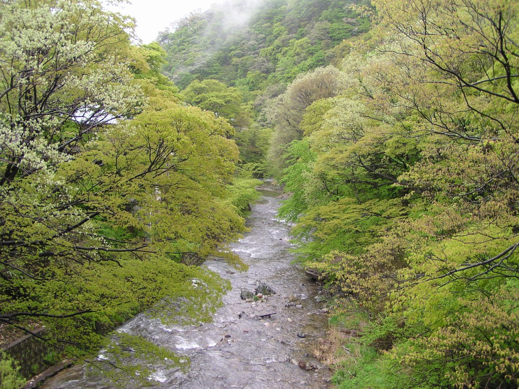 2005年5月7日に投稿者がja:磐梯熱海温泉附近で撮影したja:五百川。